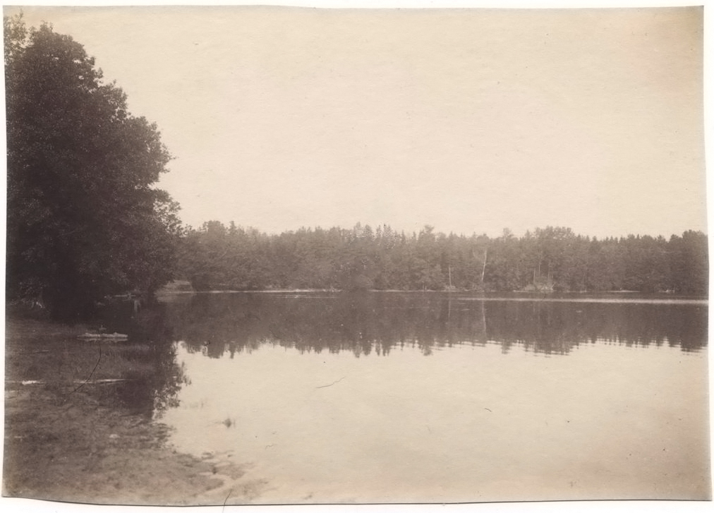 Беларуская (тарашкевіца): Возера Лосьвіда (Łośvida)